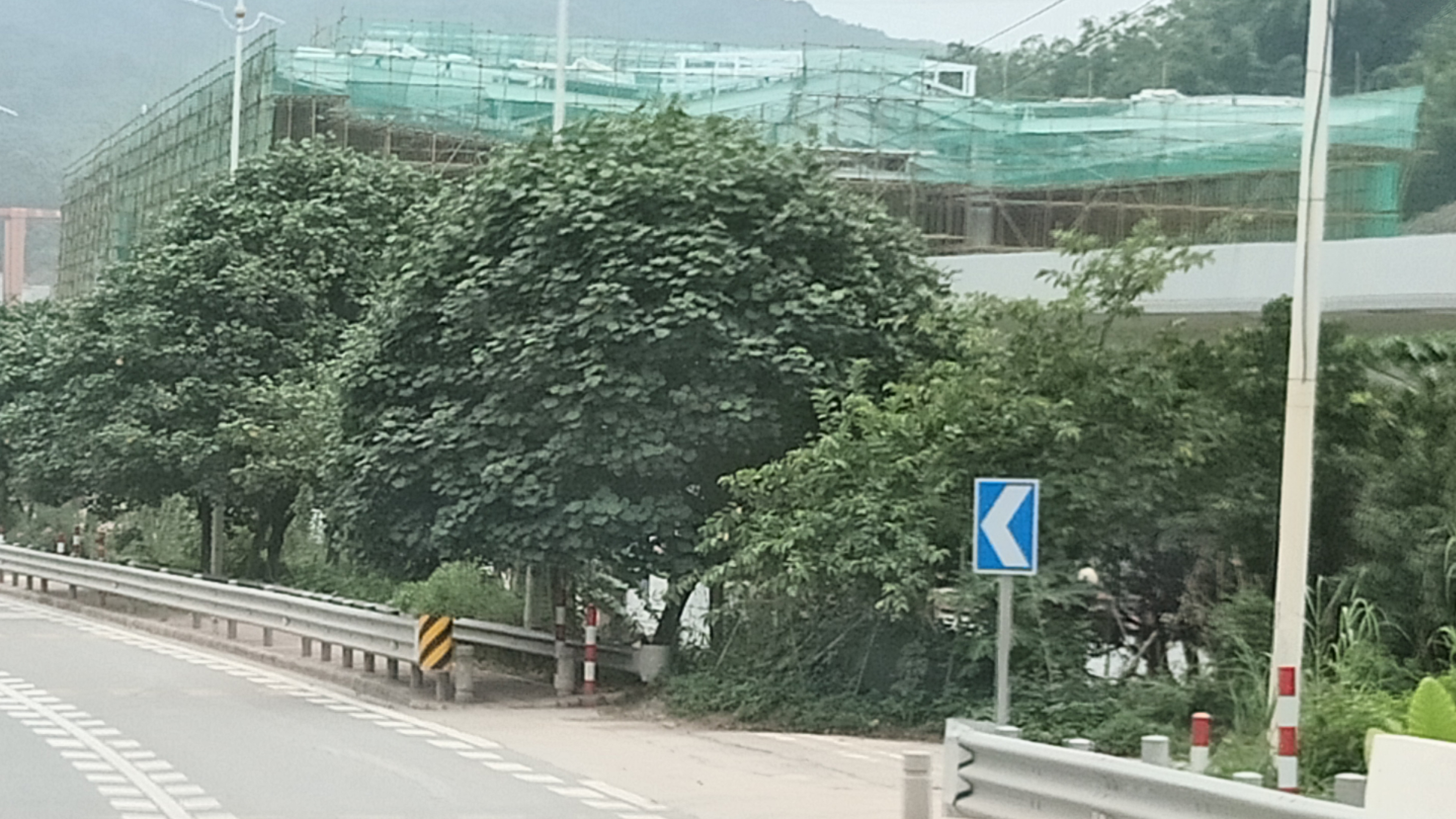 粵語: 2018年6月3號，廣州地鐵21號綫金坑站重喺度起緊。